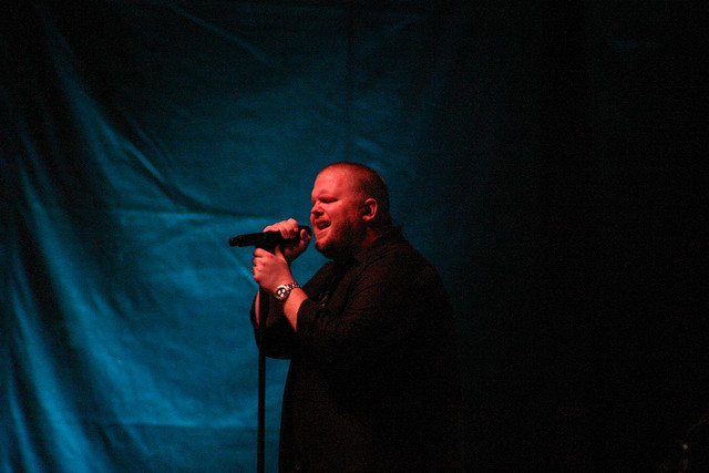 Bart Millard interpretando uno de sus temas en un concierto